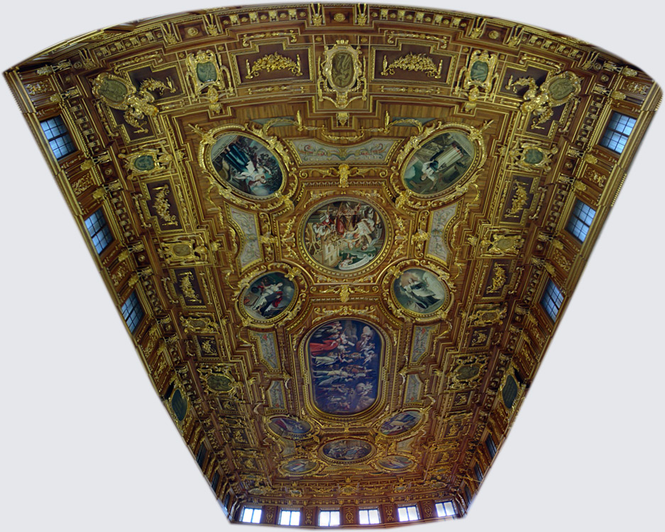 Goldener Saal (im Augsburger Rathaus), Deckenpanorama